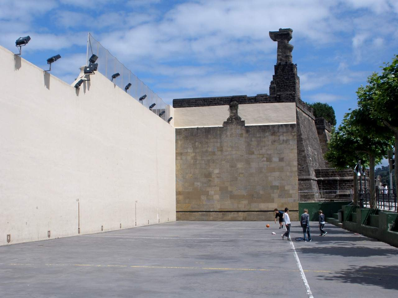 Getaria (Gipúzkoa)